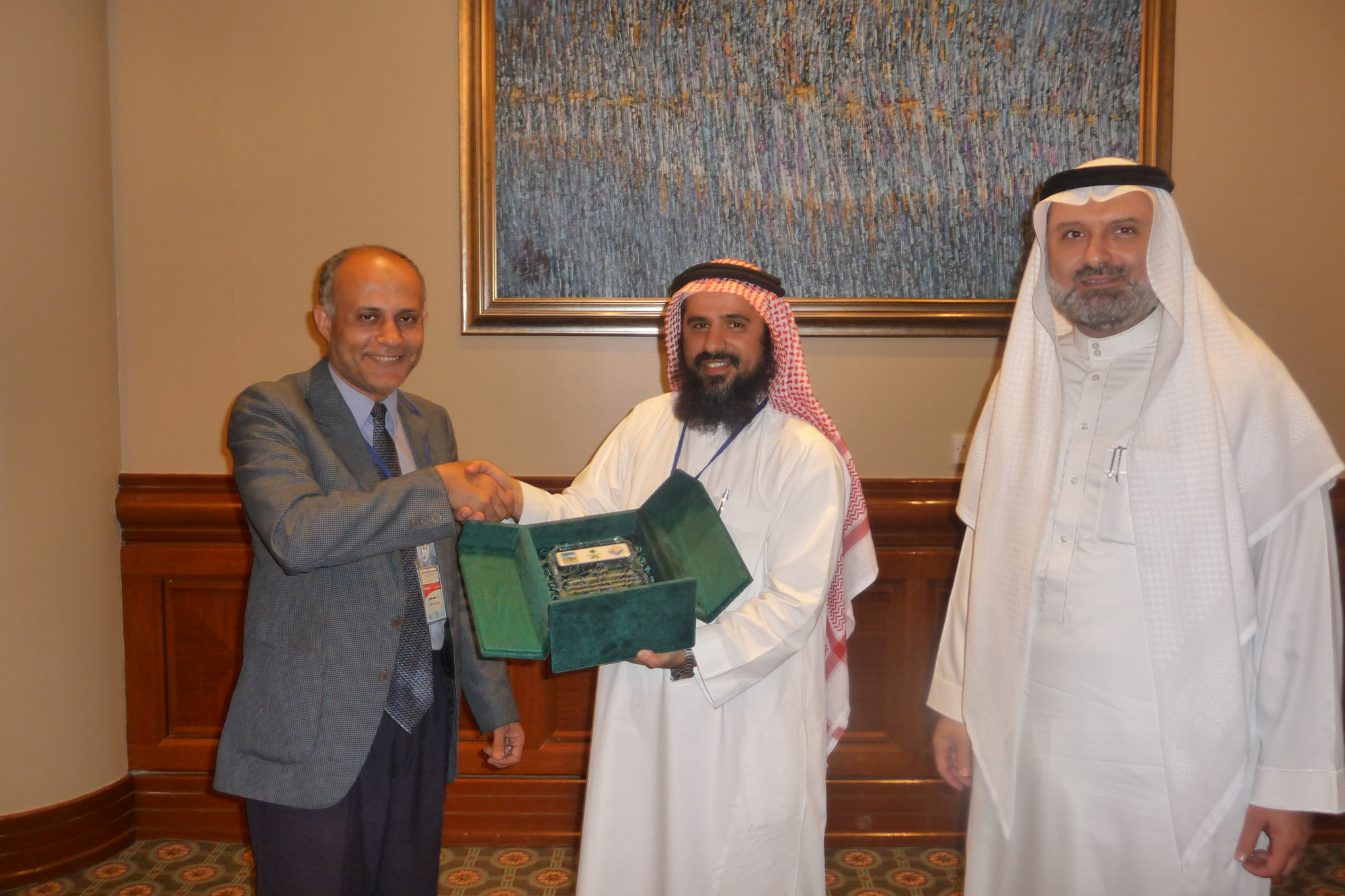 الدكتور خالد العسيرى يكرم الدكتور سعيد شلبى فى مؤتمر الطب ال